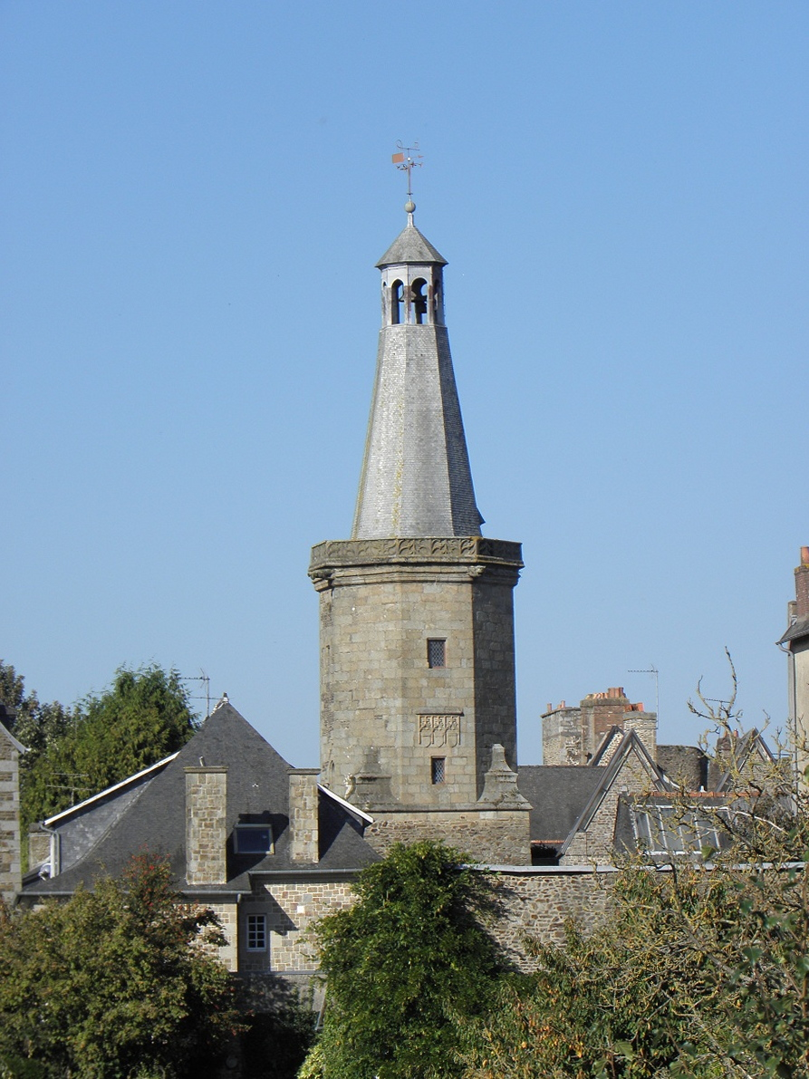 Le beffroi de Fougères (35) vue de l'église Saint-Léonard.